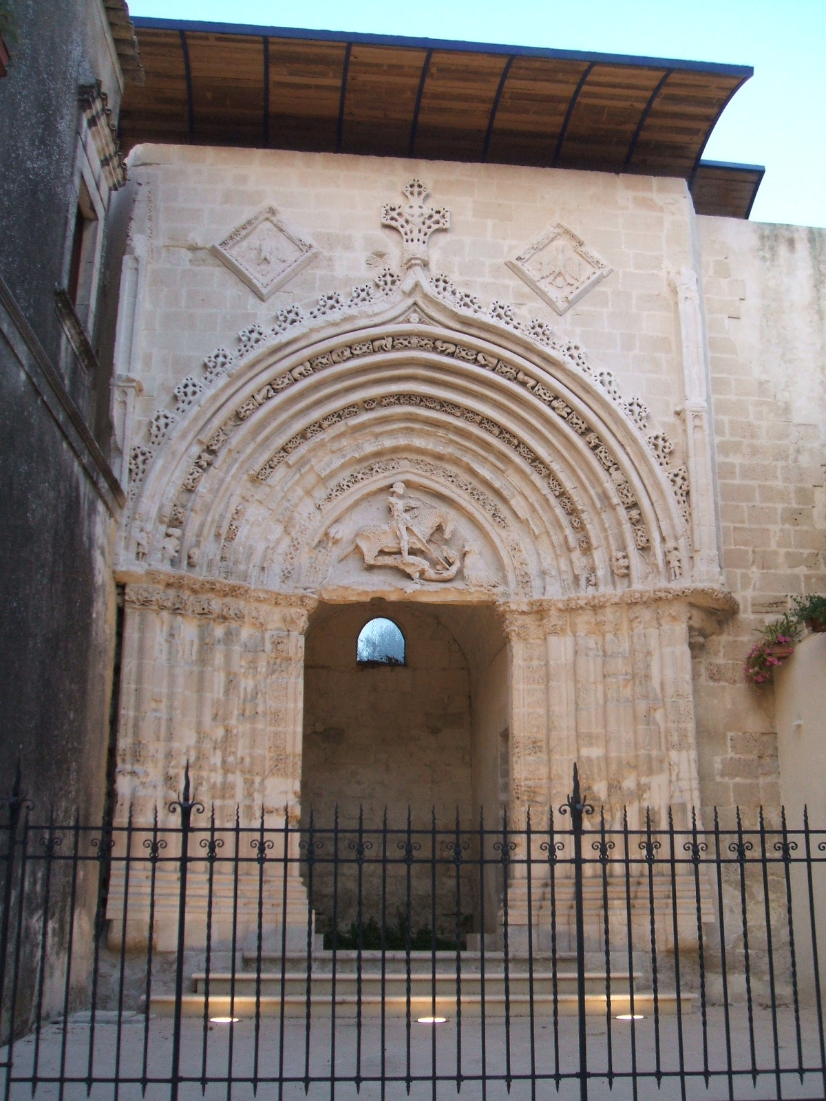 Ragusa (Sicile, Italie) : Portail de l'ancienne église S.Giorgio Vecchio (2ème moitié du XVème siècle, style gothique catalan)